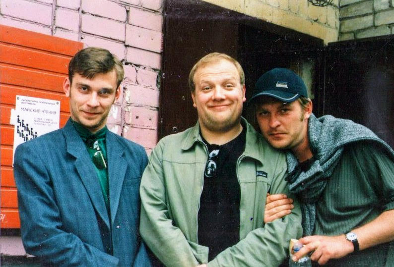 Слева направо: драматург Михаил Дурненков, сценарист Родион Белецкий, драматург Вячеслав Дурненков. Театральный центр "Голосова 20", Тольятти. Россия.